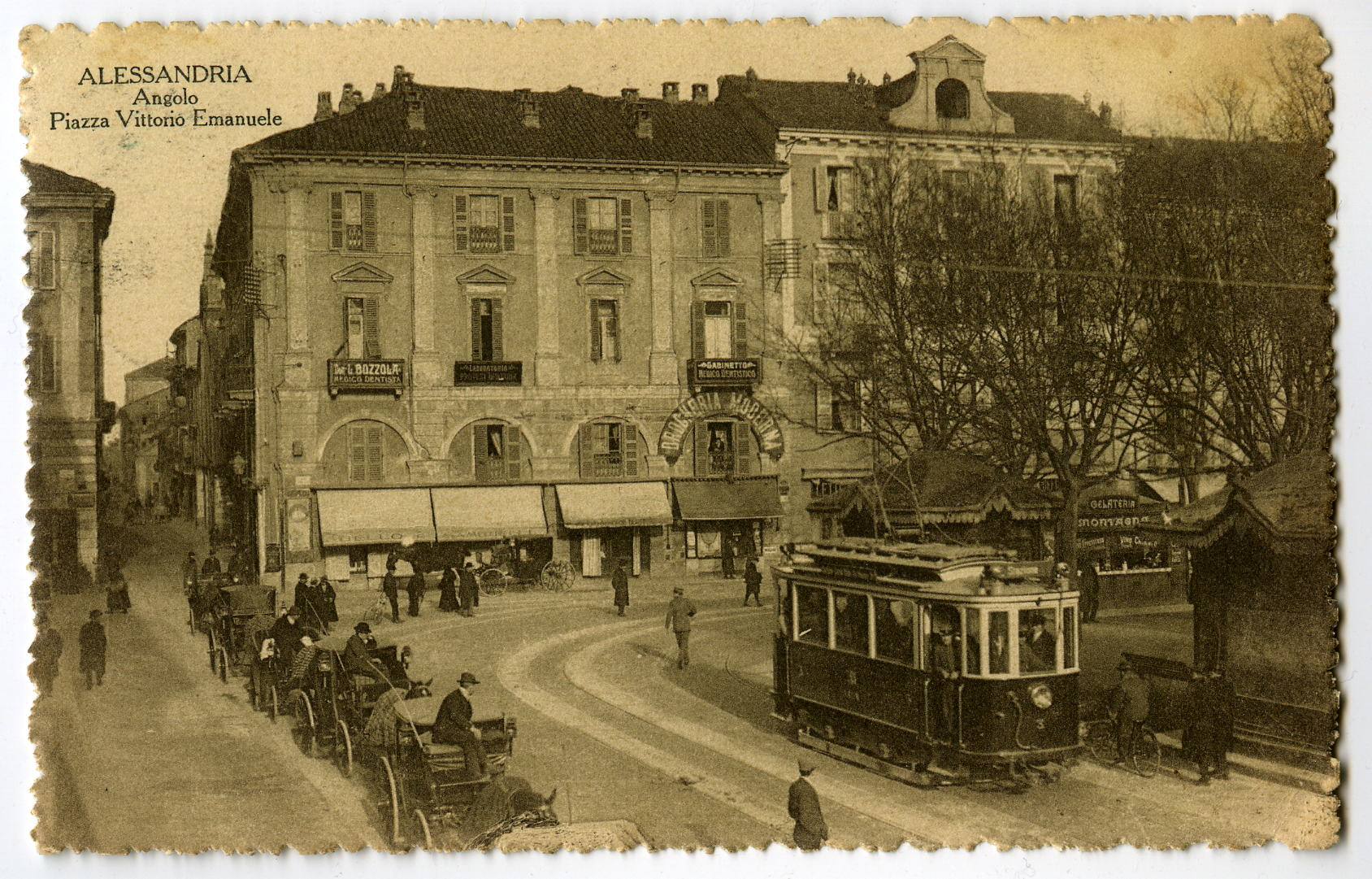 Collezione di Tony Frisina - Alessandria